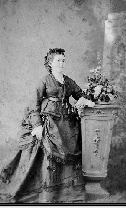 Sra. María Juana Canavery, madre del Gral. Enrique Mosconi